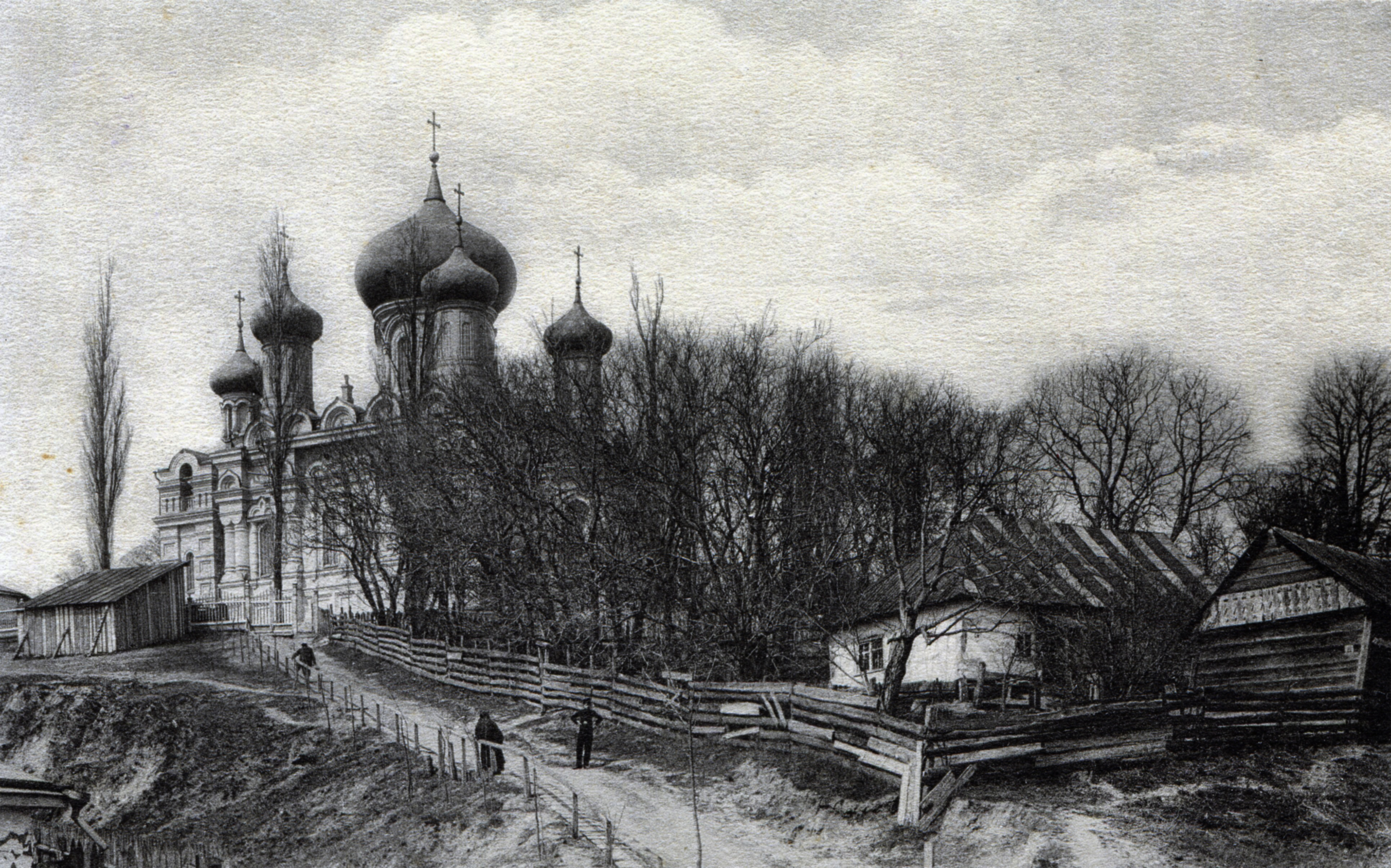 Пріорка. Свято-Покровський храм.